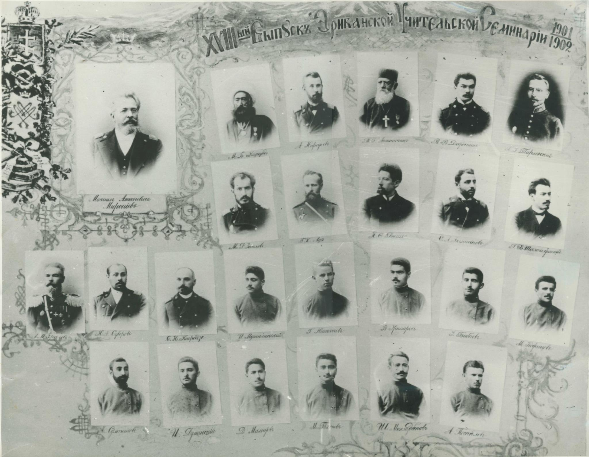 İrəvan Müəllimlər Seminariyasının 1902-ci il buraxılışı